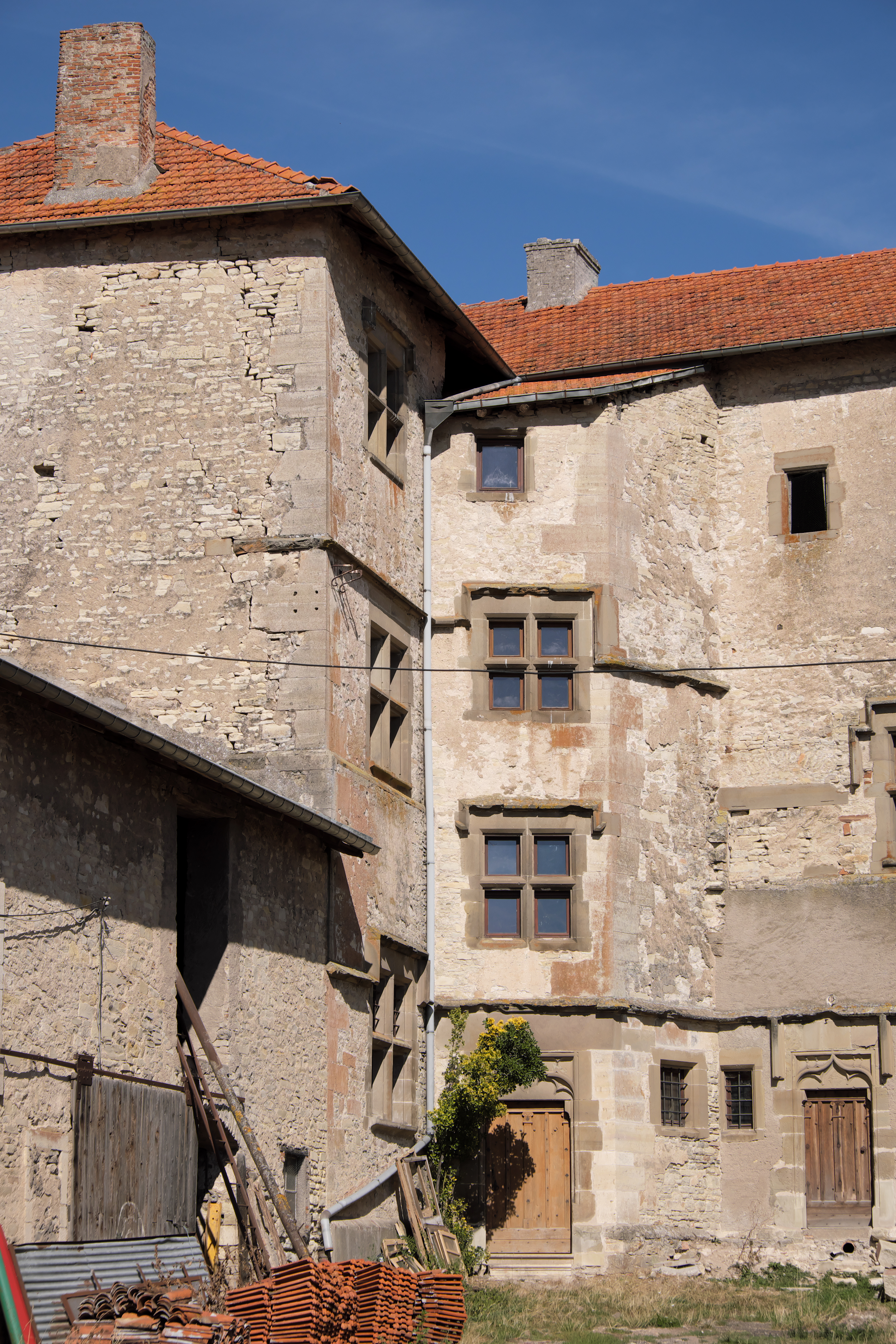 Façade sud de la maison forte (dite château) d'Haussonville en Meurthe-et-Moselle, classée sur la liste des monuments historiques le 17 février 1930.